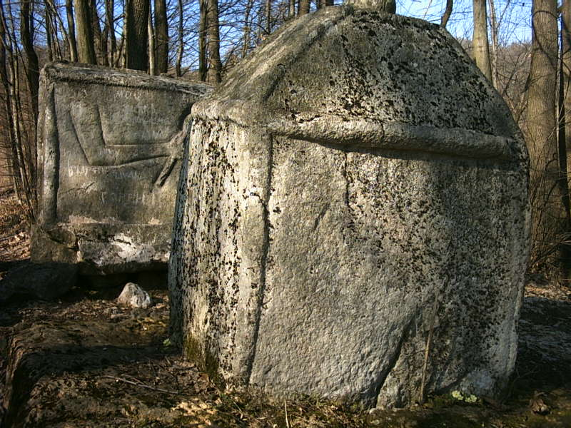 Стећци Војводе Момчила